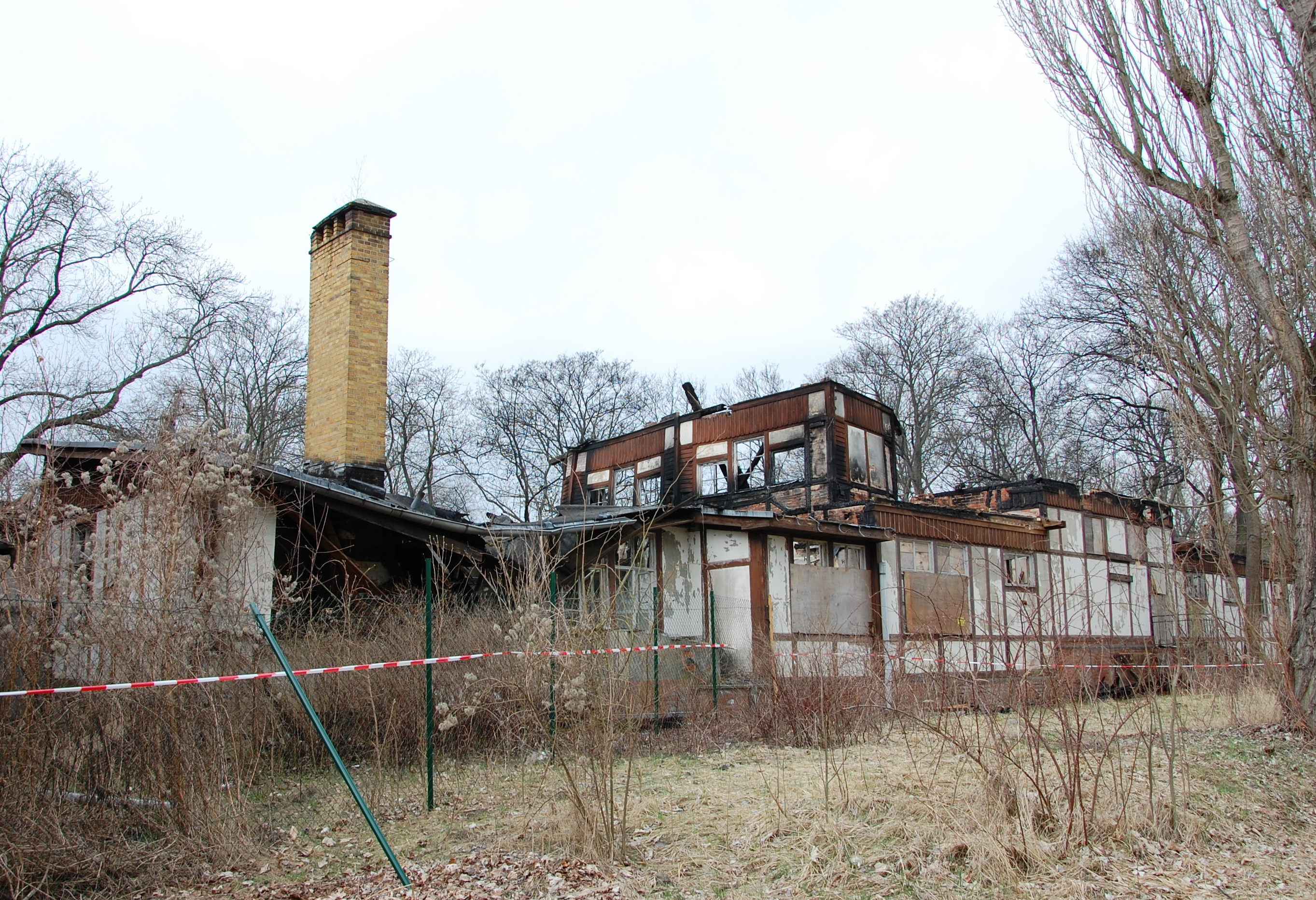 Berliner Chaussee 217 (Magdeburg) Reste Fachwerkbau nach Brand